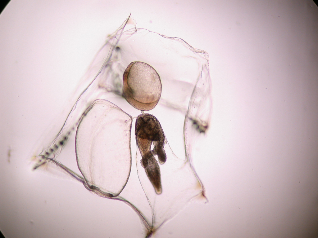 Sifonóforo planctónico